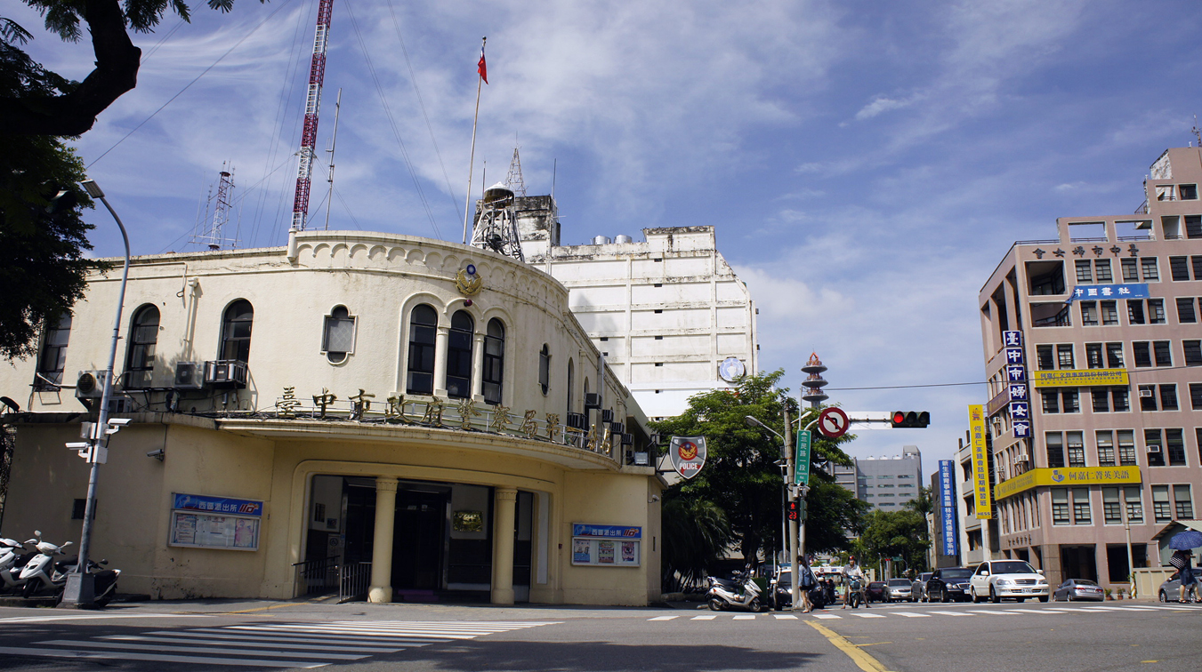 臺中市警局第一分局與三民路